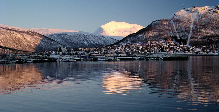 Tromsdalen seen from Tromsøya (2006-03)